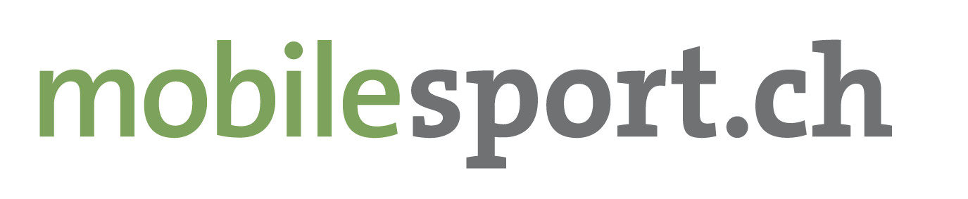 Logo von mobileport.ch